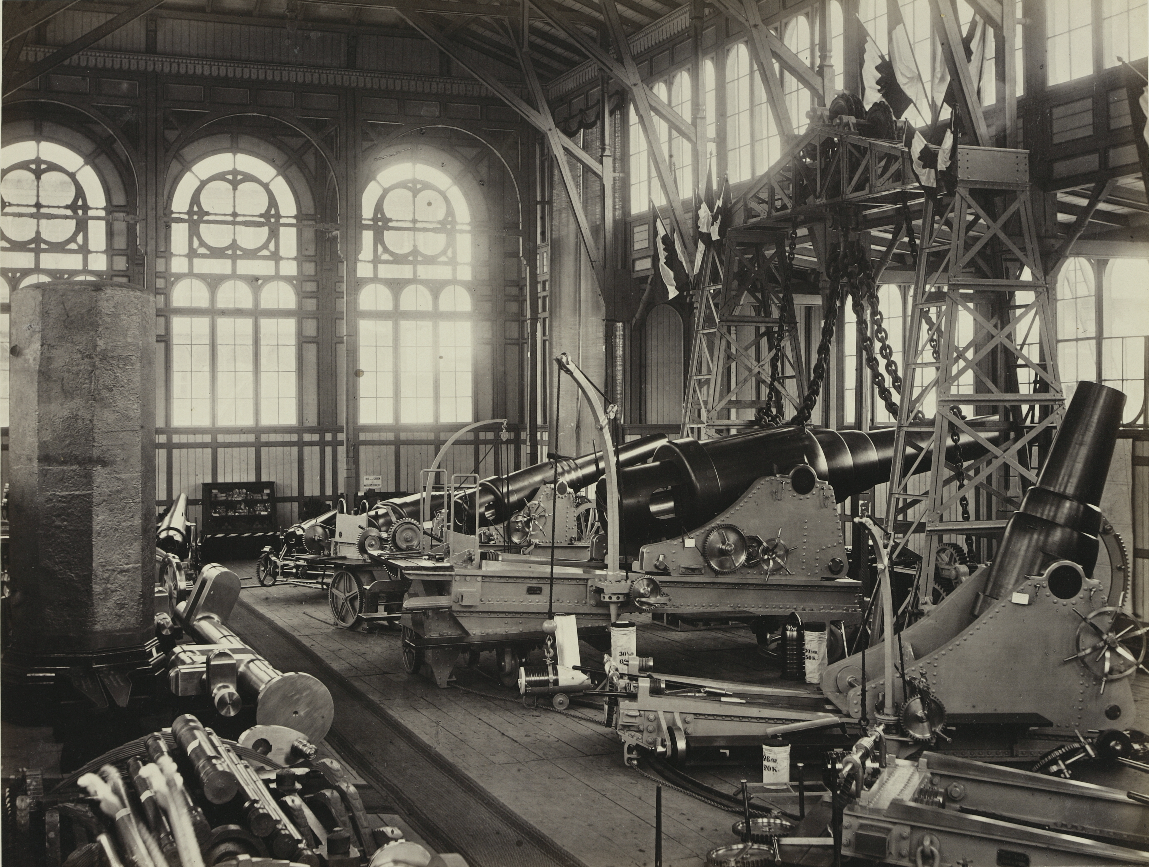 Weltausstellung 1873: "Deutsches Reich: Kruppische Geschütze". (Nr. 573)